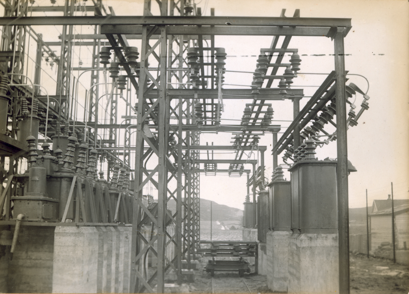 Rossebø (Haugesund halvøen og Karmøys kraftselskap). Elektrisitetsdirektoratet. Dato: xx.xx.xxxx